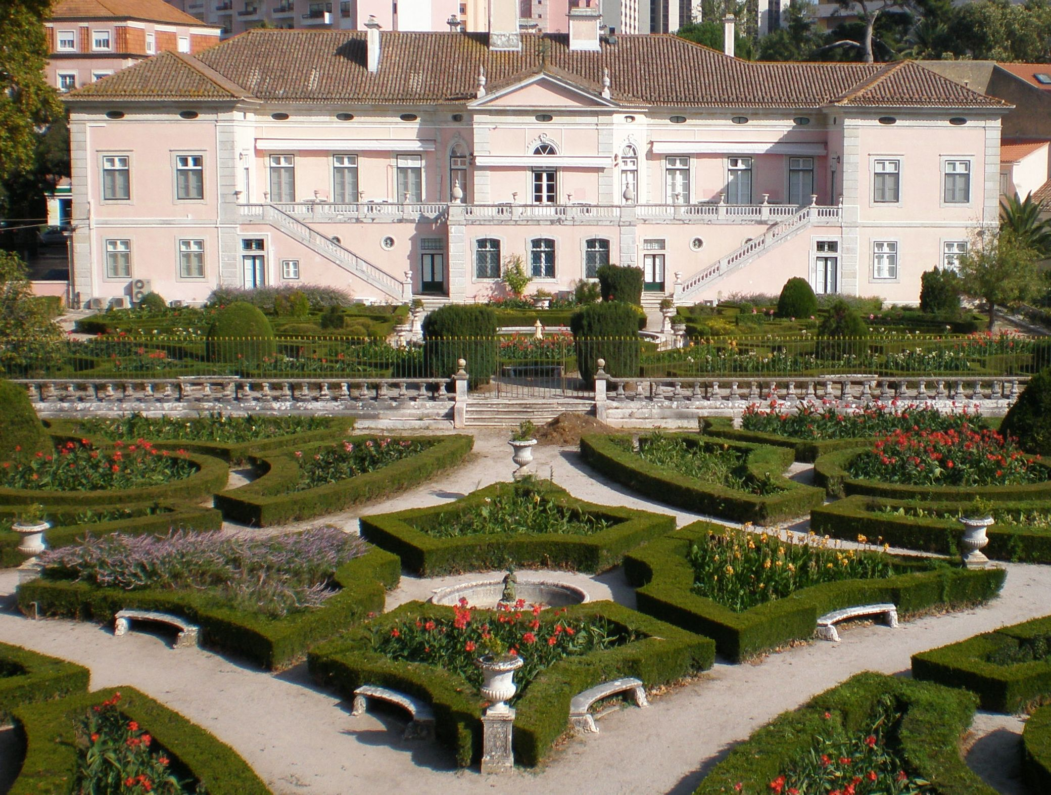 O Palácio das Laranjeiras, na cidade de Lisboa.